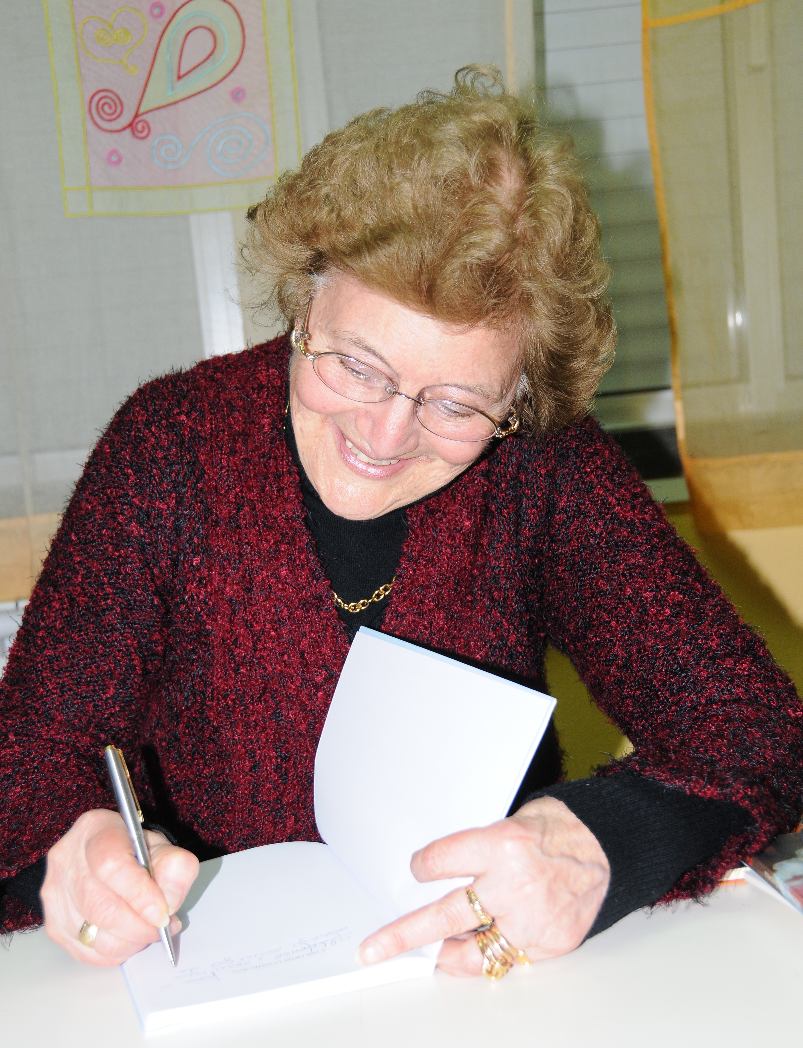 A escritora Maria do Céu Nogueira, numa sessão de autógrafos após uma palestra sobre a sua obra.